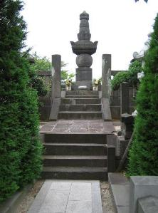 小石川伝通院にある於大の墓。